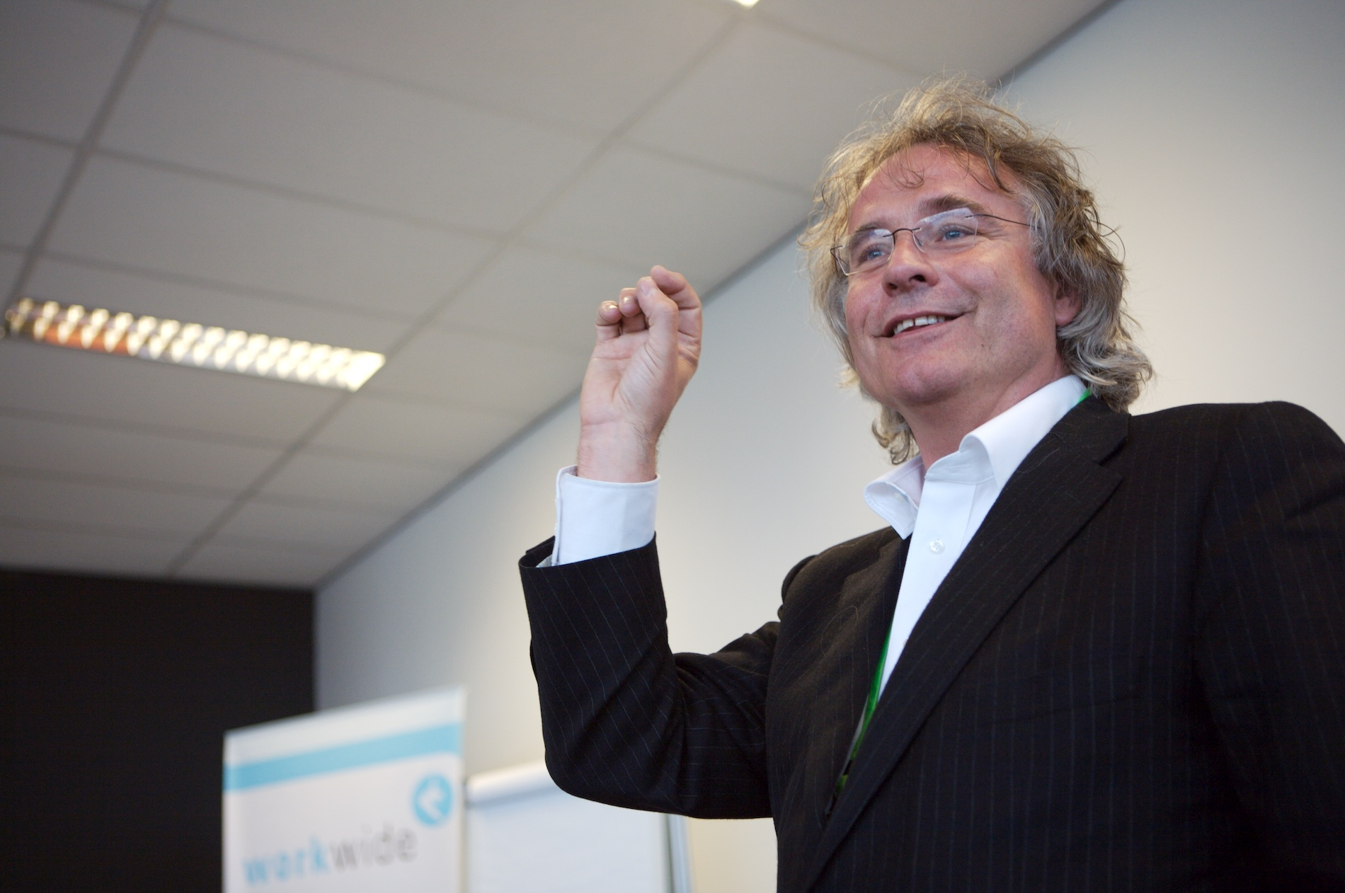 Harry Starren (De Baak) @ Zizani